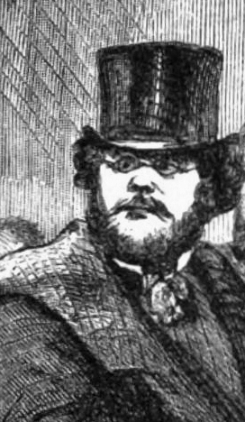 Theodor Weber, deutscher Maler im 19. Jh.